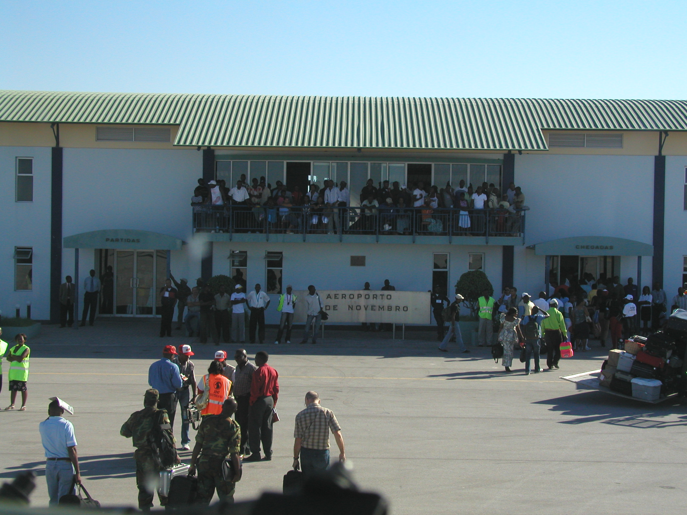 Aeroporto 11 de Novembro in Ondjiva, Angola